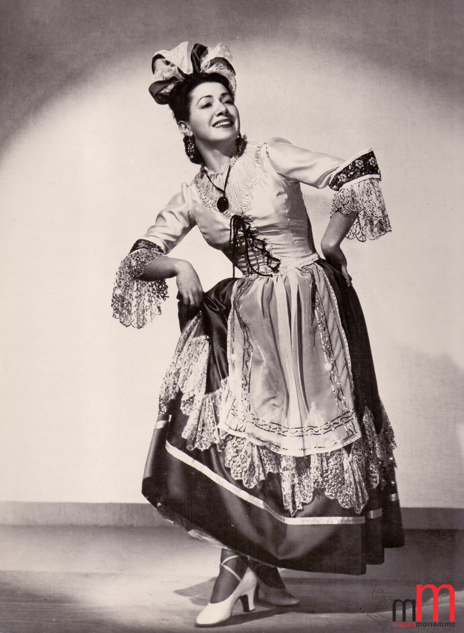 Mariemma en la Danza de la Molinera del Sombrero de Tres PIcos de Manuel de Falla. Circa final de la década de los 40